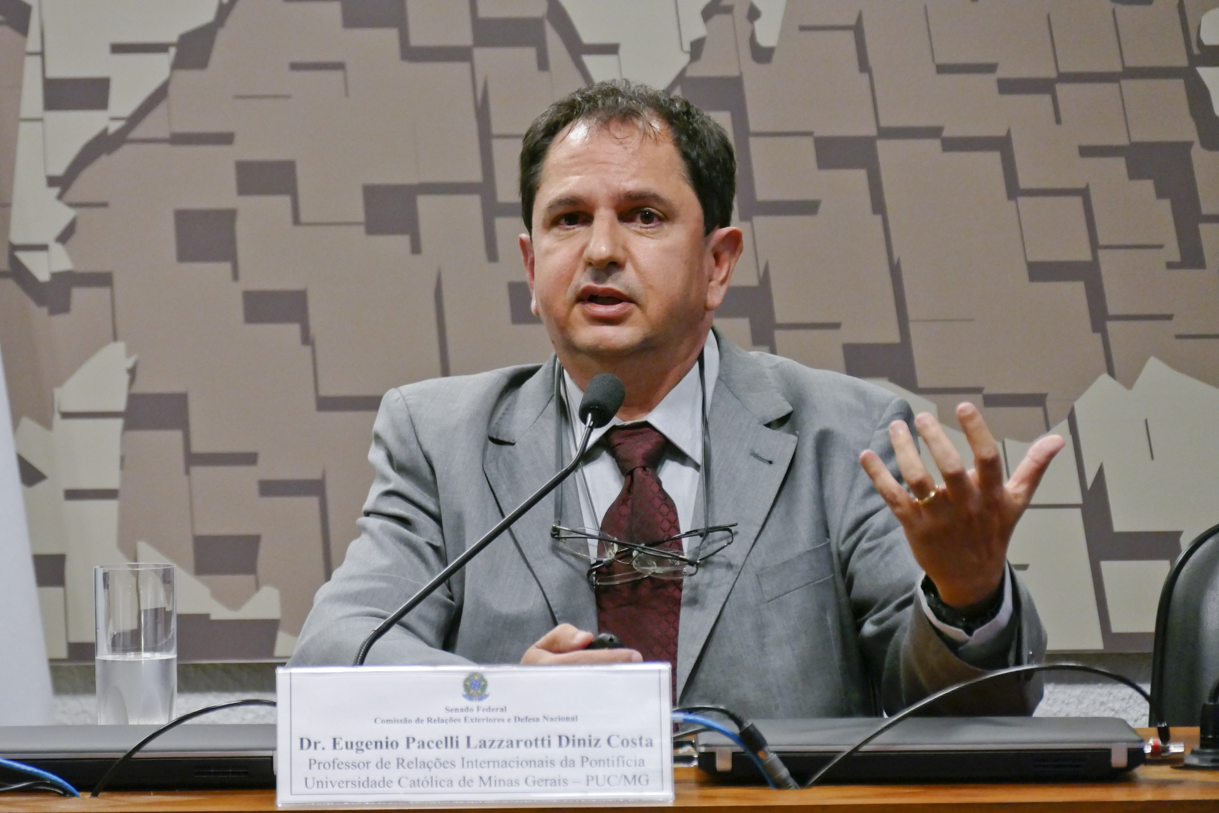 Comissão de Relações Exteriores e Defesa Nacional (CRE) realiza ciclo de debates "O Brasil e a Ordem Internacional: Estender Pontes ou Erguer Barreiras?" 8º Painel: Ásia - Proliferação nuclear (Irã, Índia e Paquistão) - A questão Coreia x EUA. À mesa em pronunciamento, presidente da Associação Brasileira de Relações Internacionais (ABRI), doutor em Engenharia de Produção (Estudos Estratégicos) pela Universidade Federal do Rio de Janeiro (UFRJ) e professor do Departamento de Relações Internacionais da Pontifícia Universidade Católica de Minas Gerais (PUC-Minas), Eugênio Pacelli Lazzarotti Diniz Costa. Foto: Roque de Sá/Agência Senado